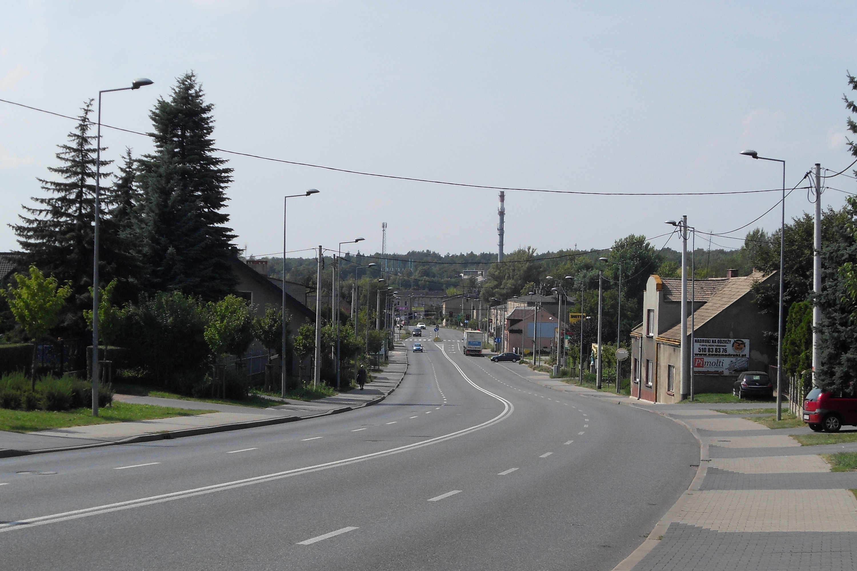 Ulica Warszawska w Częstochowie, w dzielnicy Wyczerpy-Aniołów